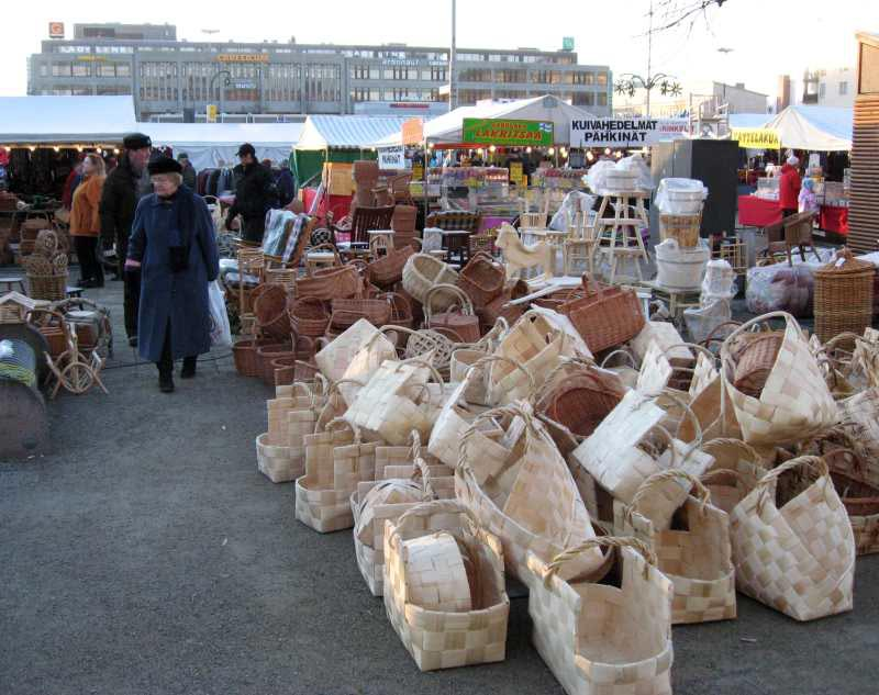 Joensuu market place